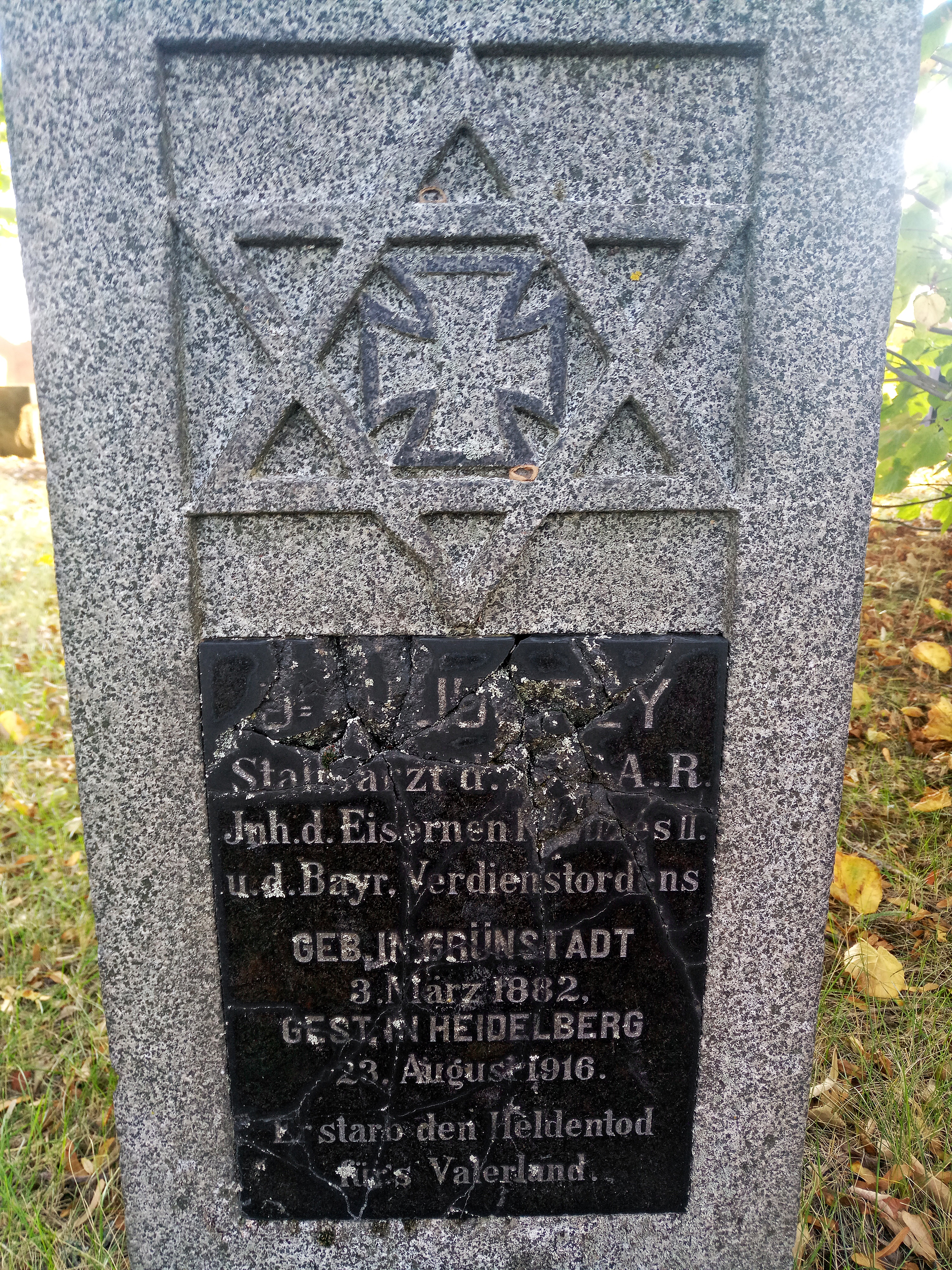 Grünstadt Judenfriedhof, geschändeter Grabstein Stabsarzt Dr. Julius Fey, 1916